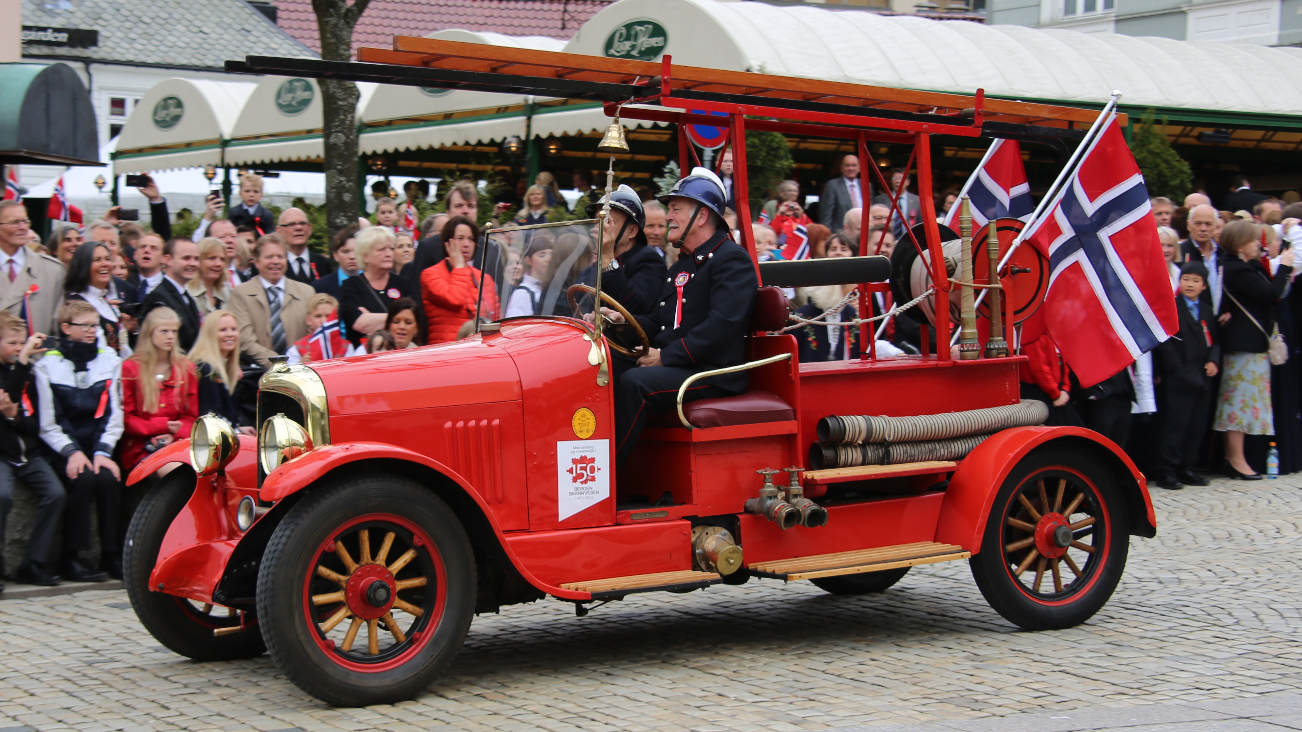 Bergen brannvesen